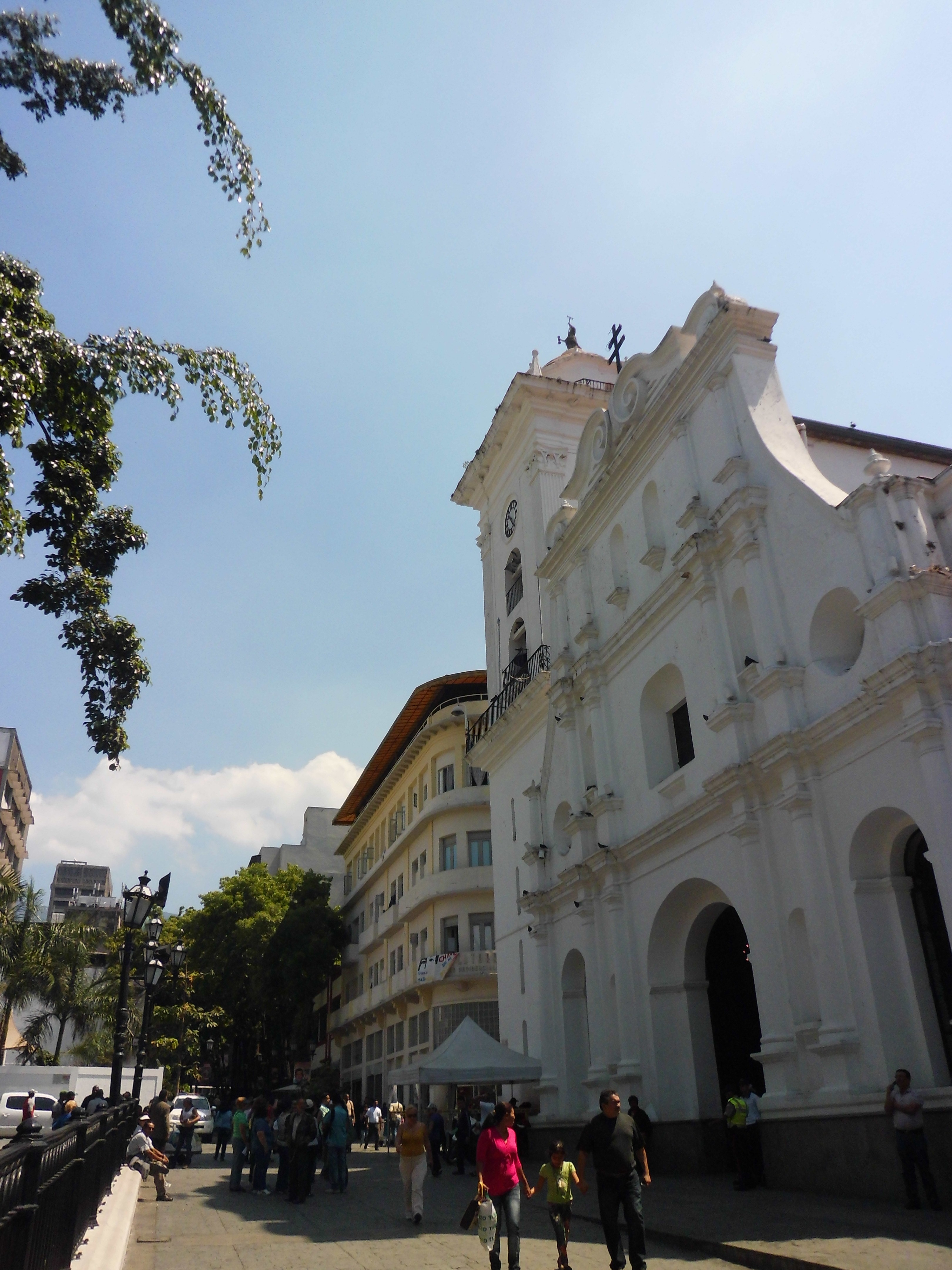 Catedral de Caracas Distrito Capital - Venezuela